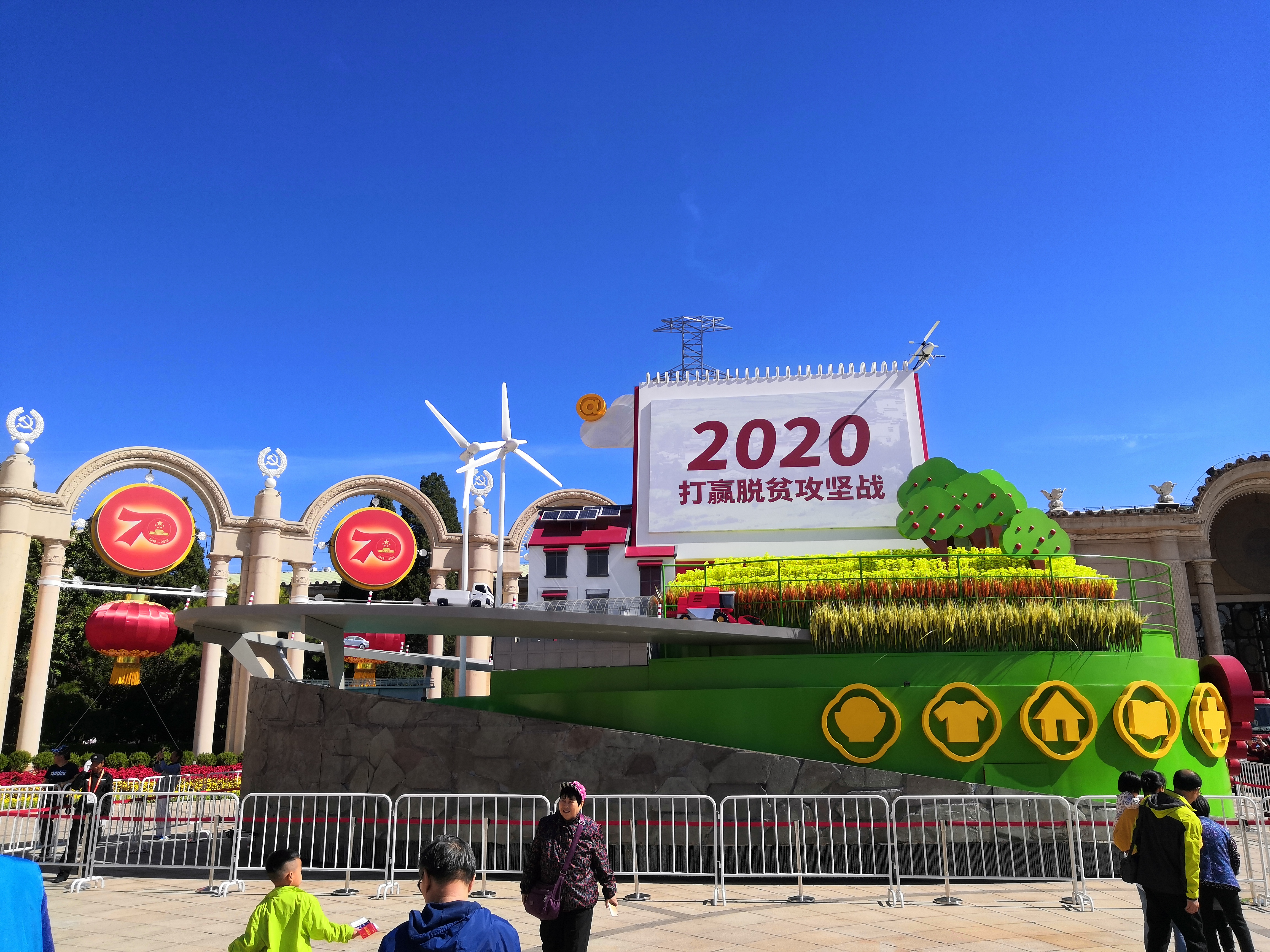 中文（中国大陆）: 伟大历程 辉煌成就——庆祝中华人民共和国成立70周年大型成就展